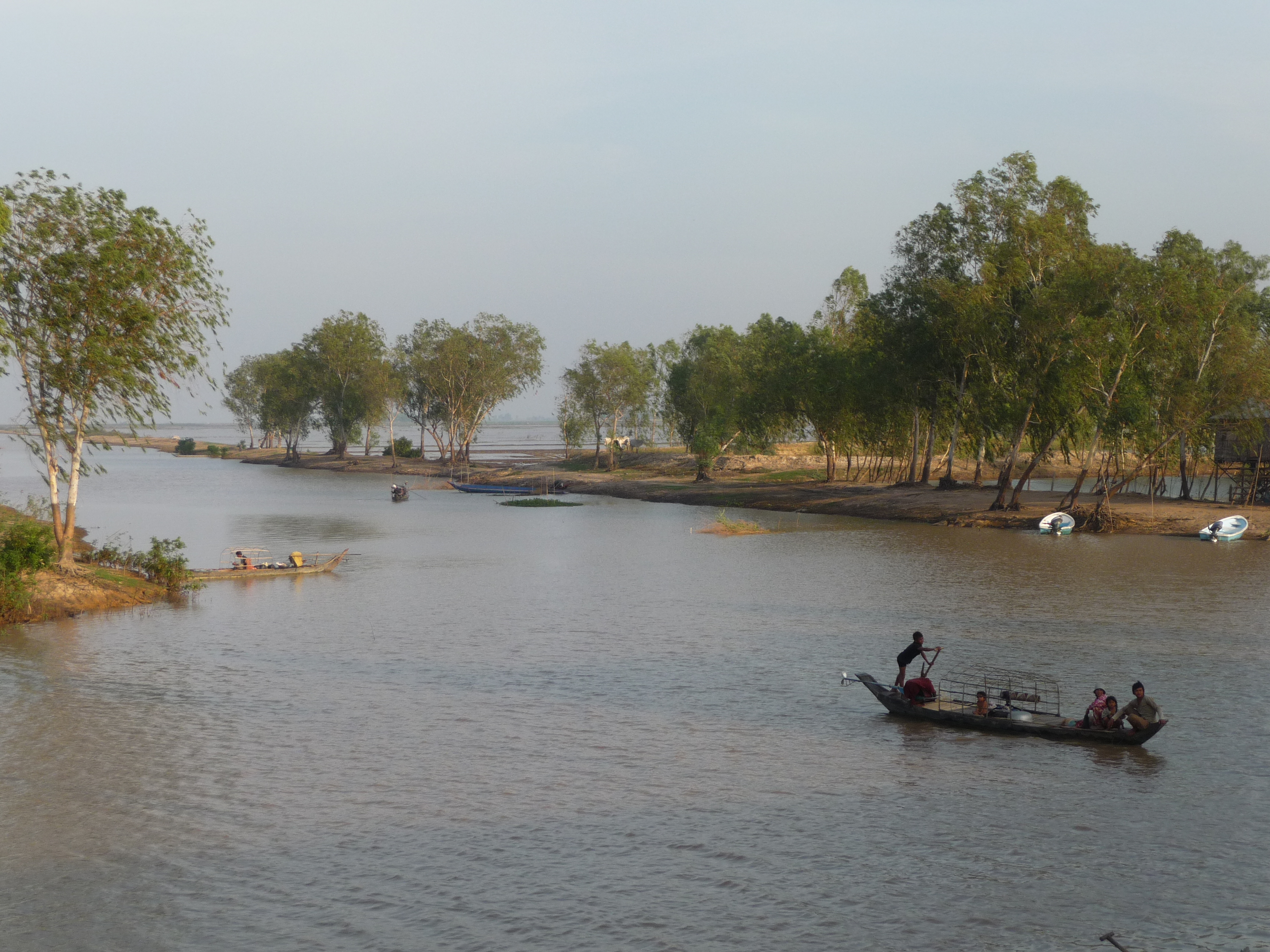 canal de Takeo à Angkor Borei